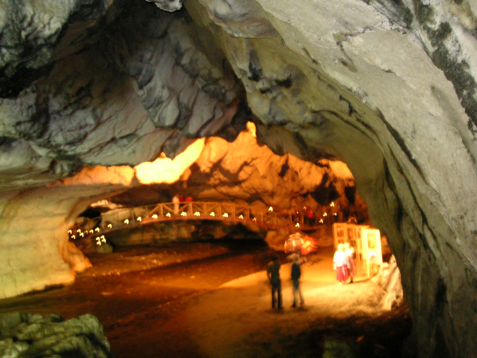 Concert in Pestera Bolii-Muntii Sureanu-Jud Hunedoara-Romania Bolii Cave-Hunedoara-Romania-Sureanu Mountains